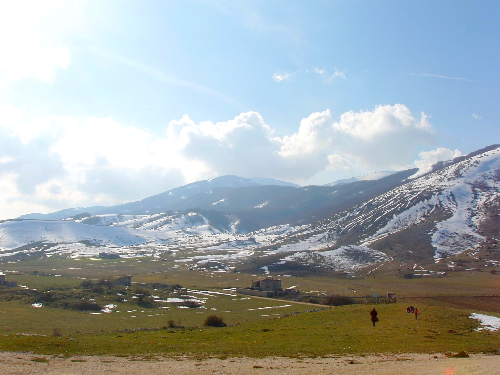 Altopiano di Rascino - Rieti - Italy